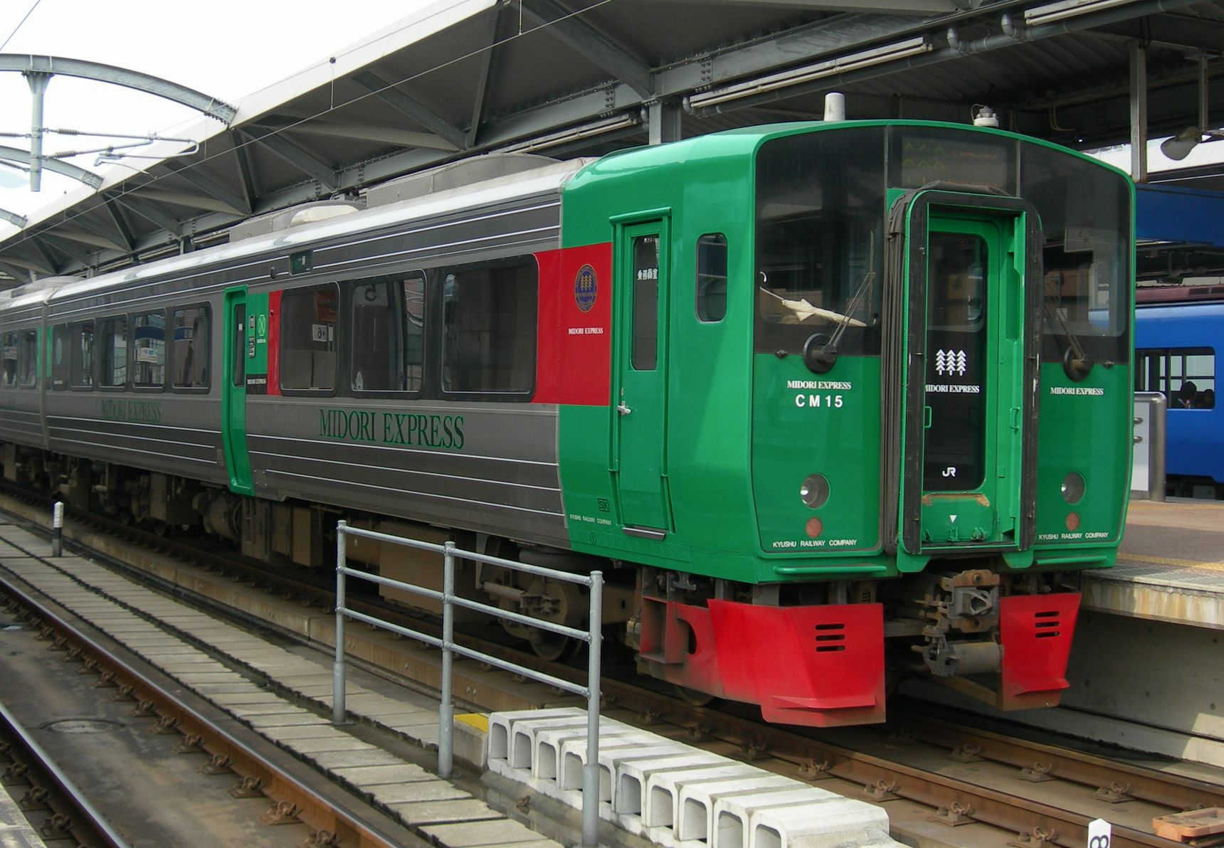 JR九州783系電車クロハ782形100番台